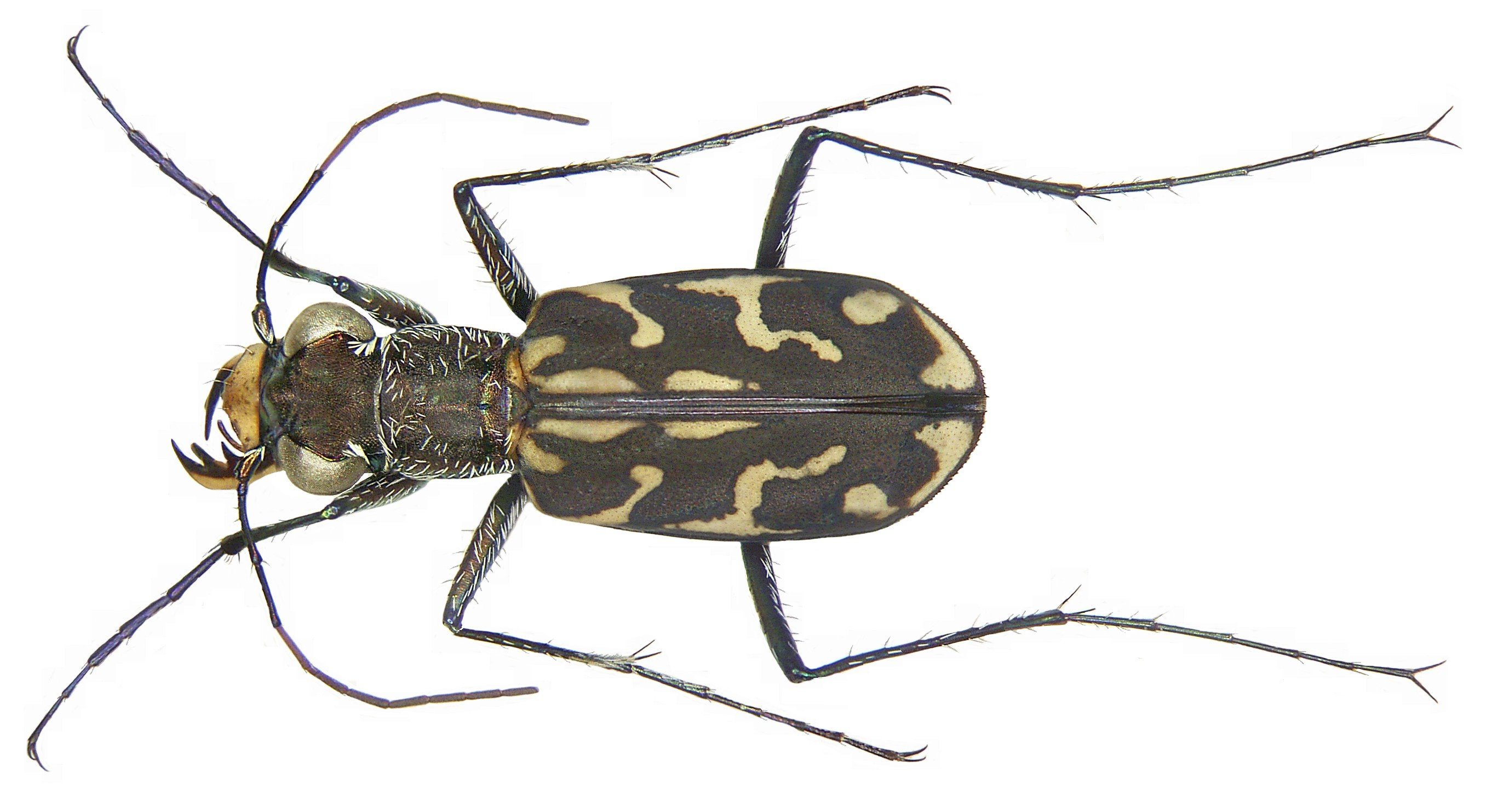 Familie: Carabidae Grösse: 10,5 mm Fundort: Kenia, Mombasa, Diani Beach leg. U.Schmidt, 1990; det. J.Gebert, 2007 Foto: U.Schmidt, 2008